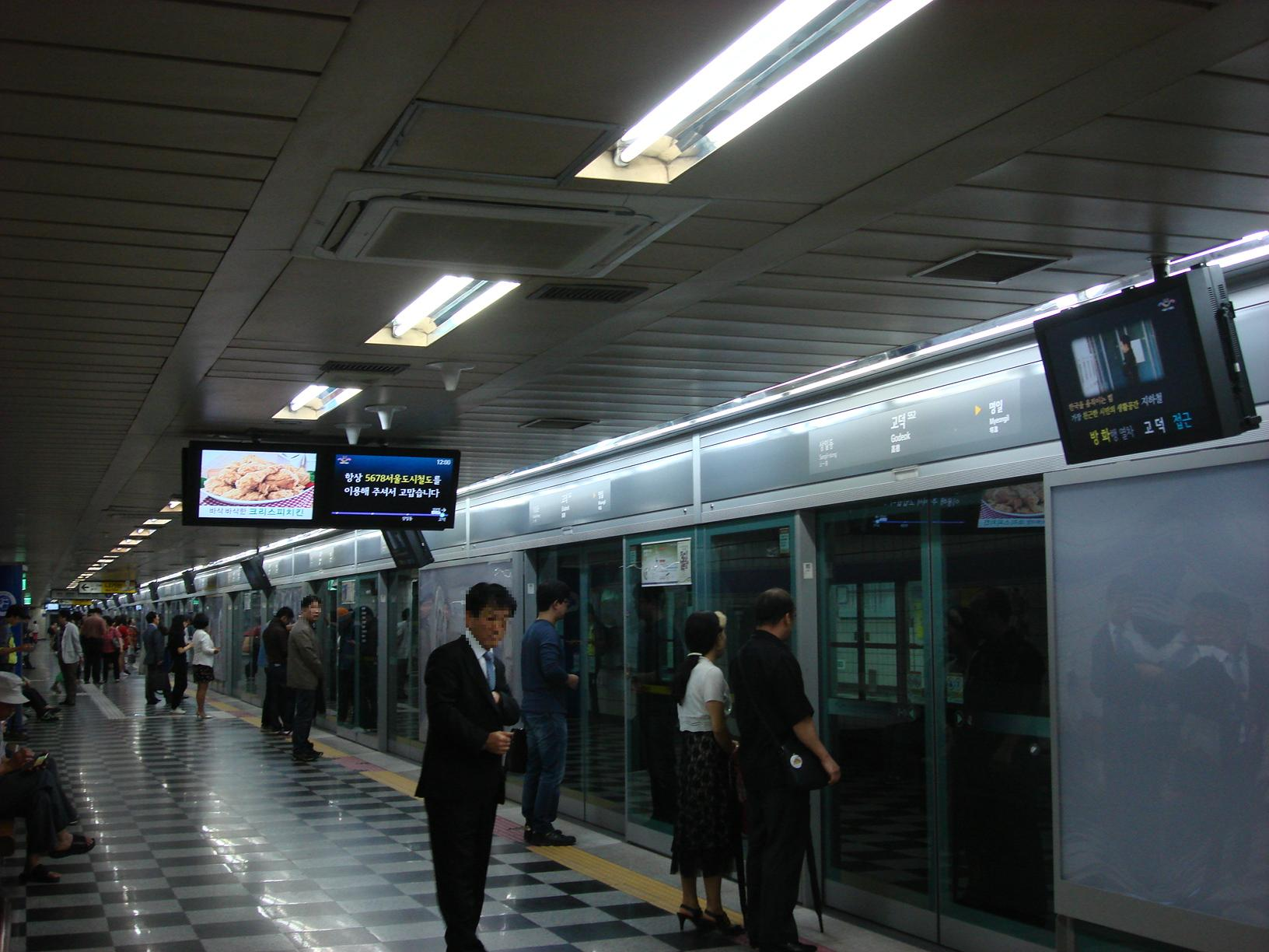 고덕역 승강장